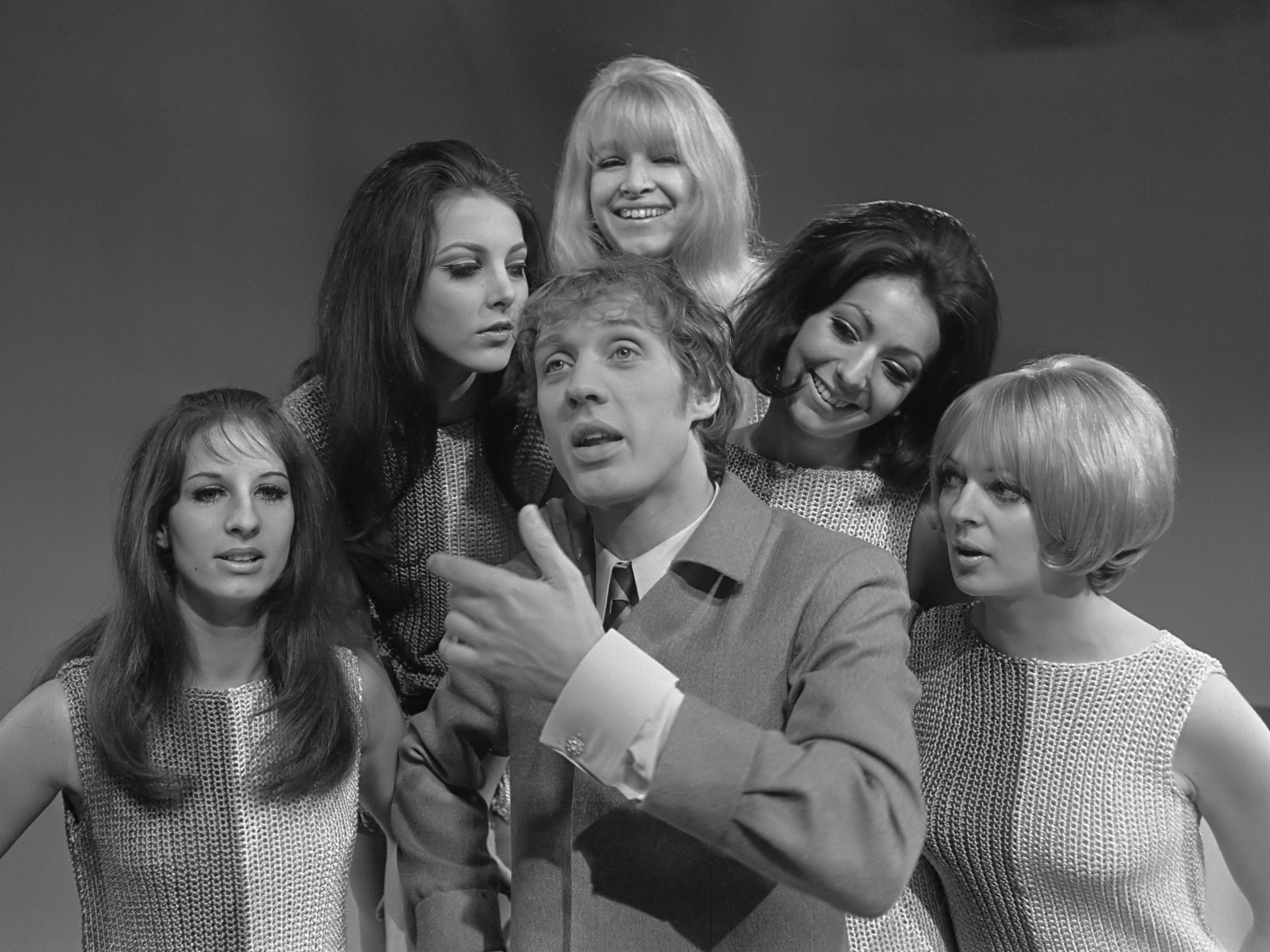 TV show van Herman van Veen; Herman van Veen temidden van de groep Pan's People uit Engeland. Van links naar rechts: Dee Dee Wilde, Louise Clarke, Babs Lord, Ruth Pearson en Andi Rutherford. 6 november 1968